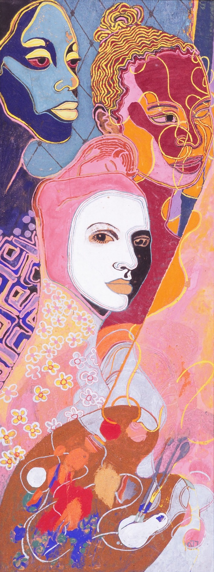 Svala Þórisdóttir Salman, sjálfsmynd gerð 1977.